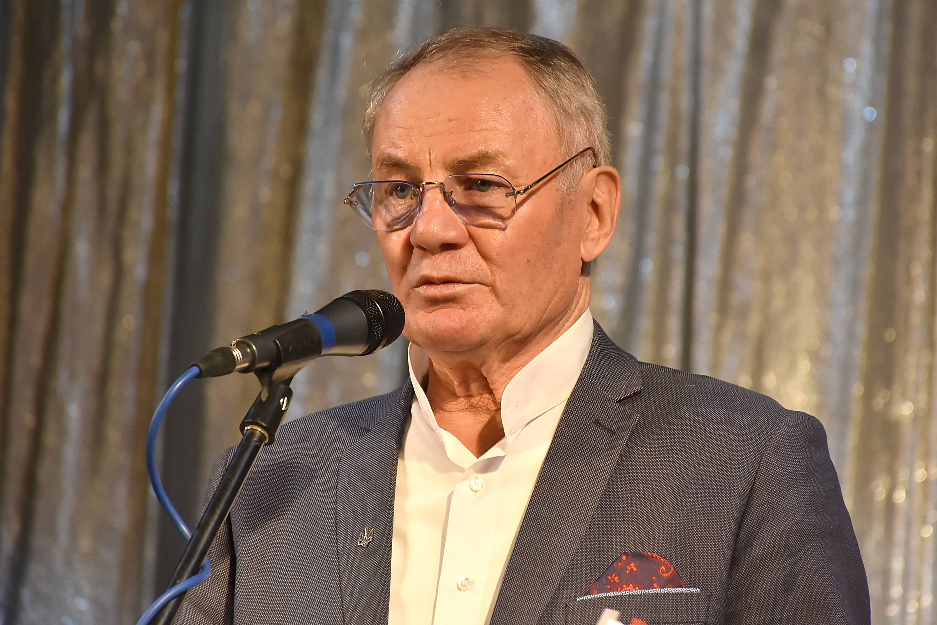 Володимир Яворівський під час зустрічі з читачами-тернополянами в Тернопільській обласній філармонії 13 березня 2019 року.